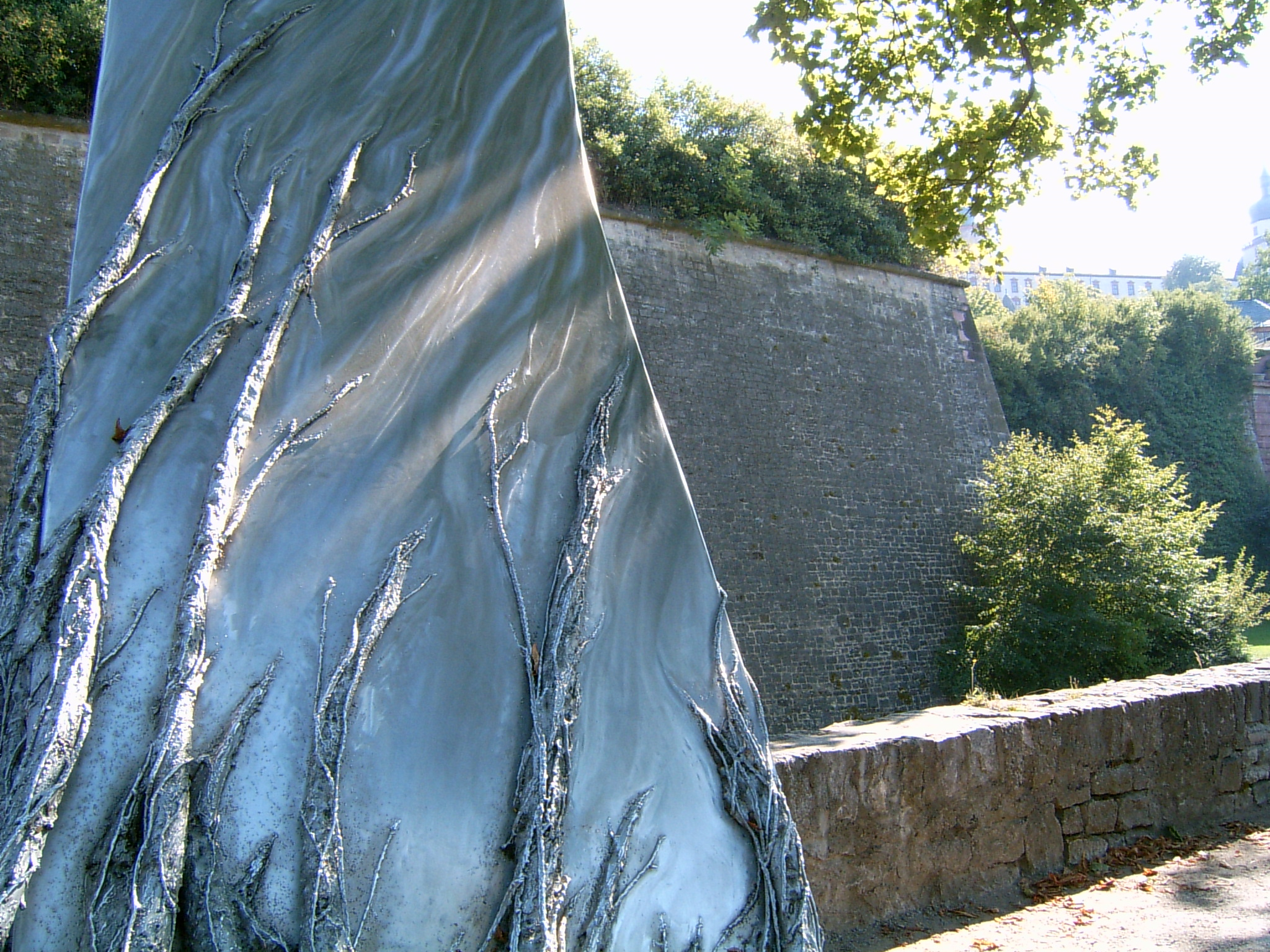 Denkmal, das an die blutige Niederschlagung des Bauernaufstandes 1525 bei der Festung Marienberg in Würzburg erinnert.